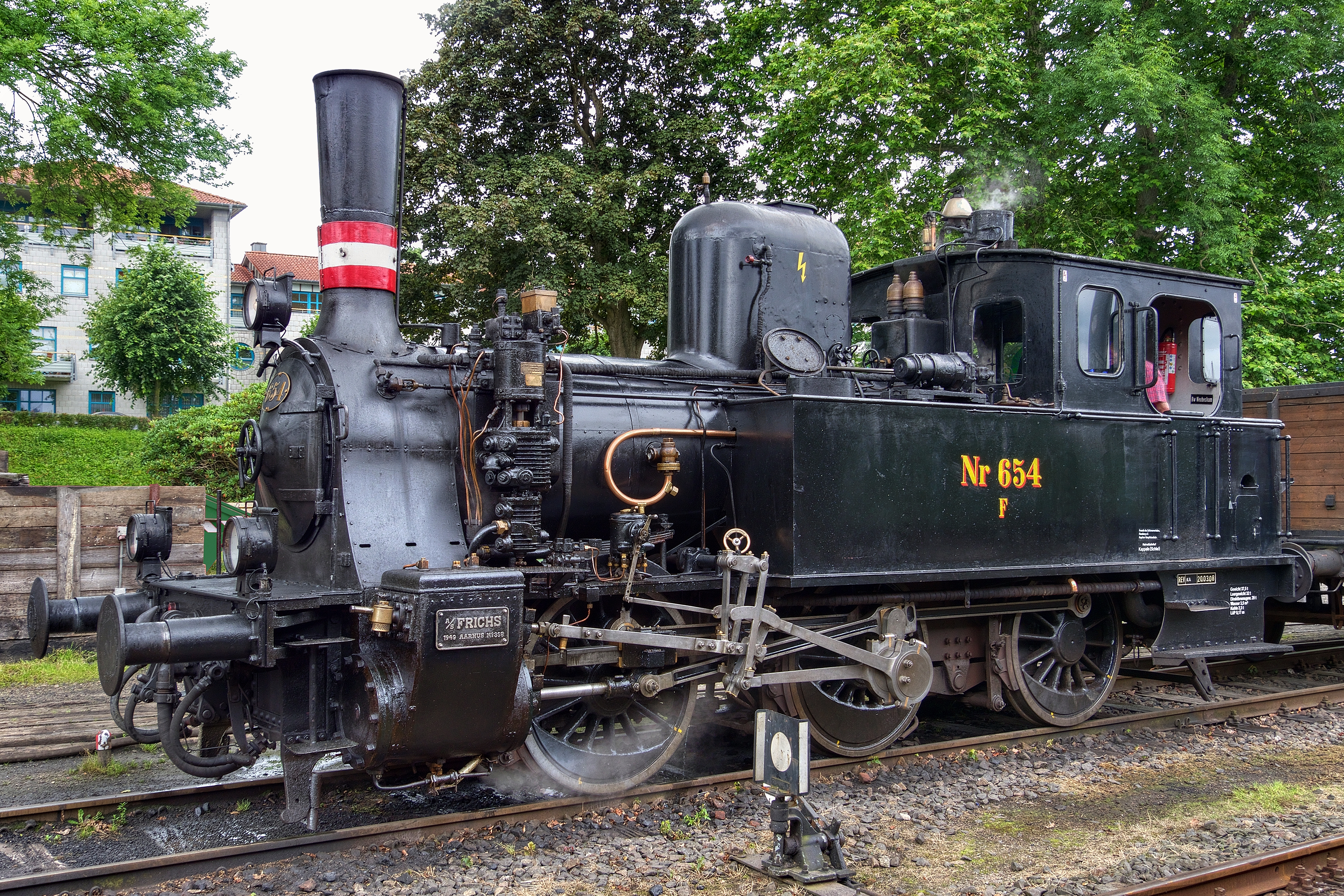 Dänische Dampflokomotive DSB Litra F, Nr. 654, der Angelner Dampfeisenbahn; Aufnahme in Kappeln am 18. Juli 2012. Das Foto ist ein HDR-Bild aus fünf Einzelaufnahmen.